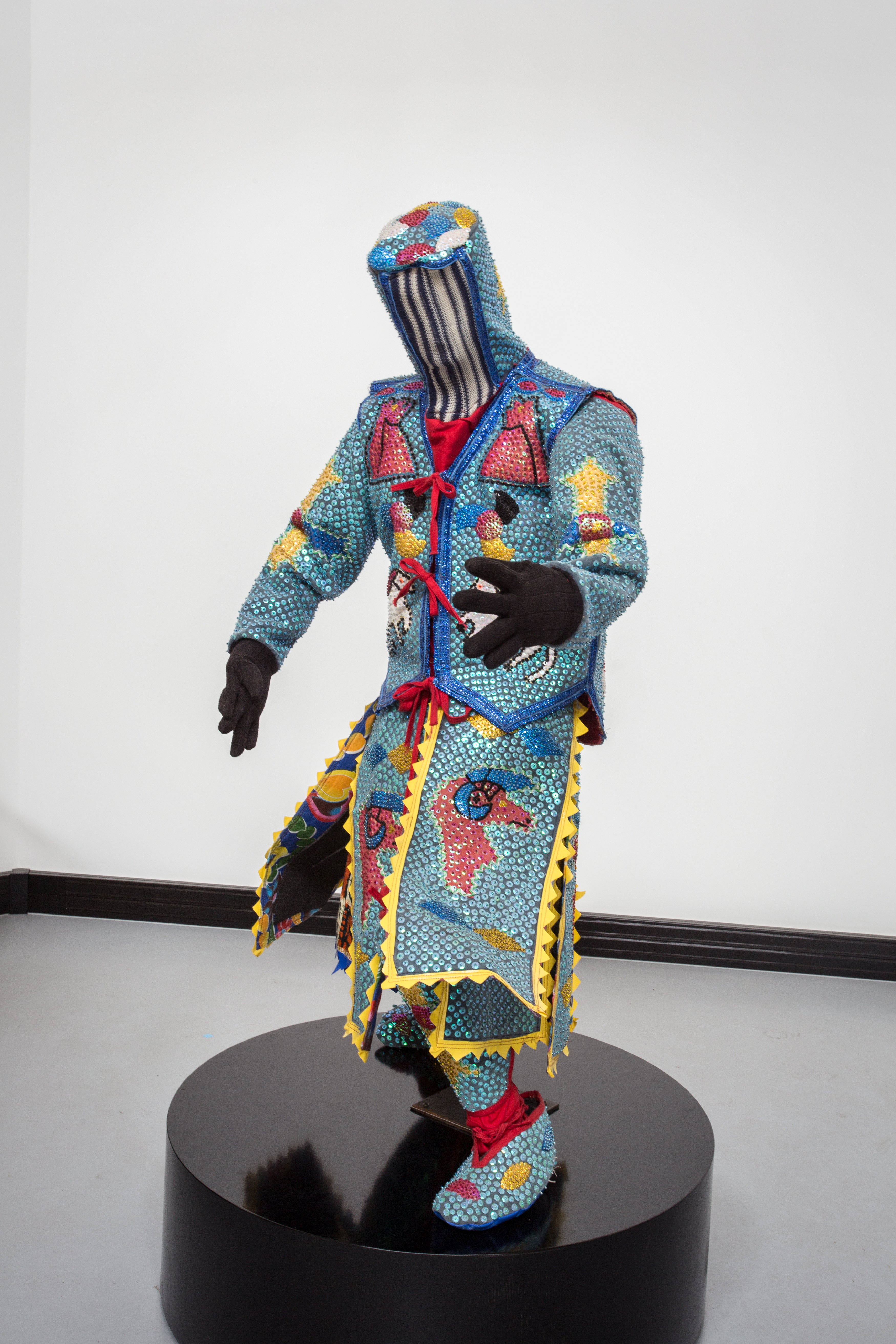 Photo d’une exposition du château Vodou de Strasbourg.